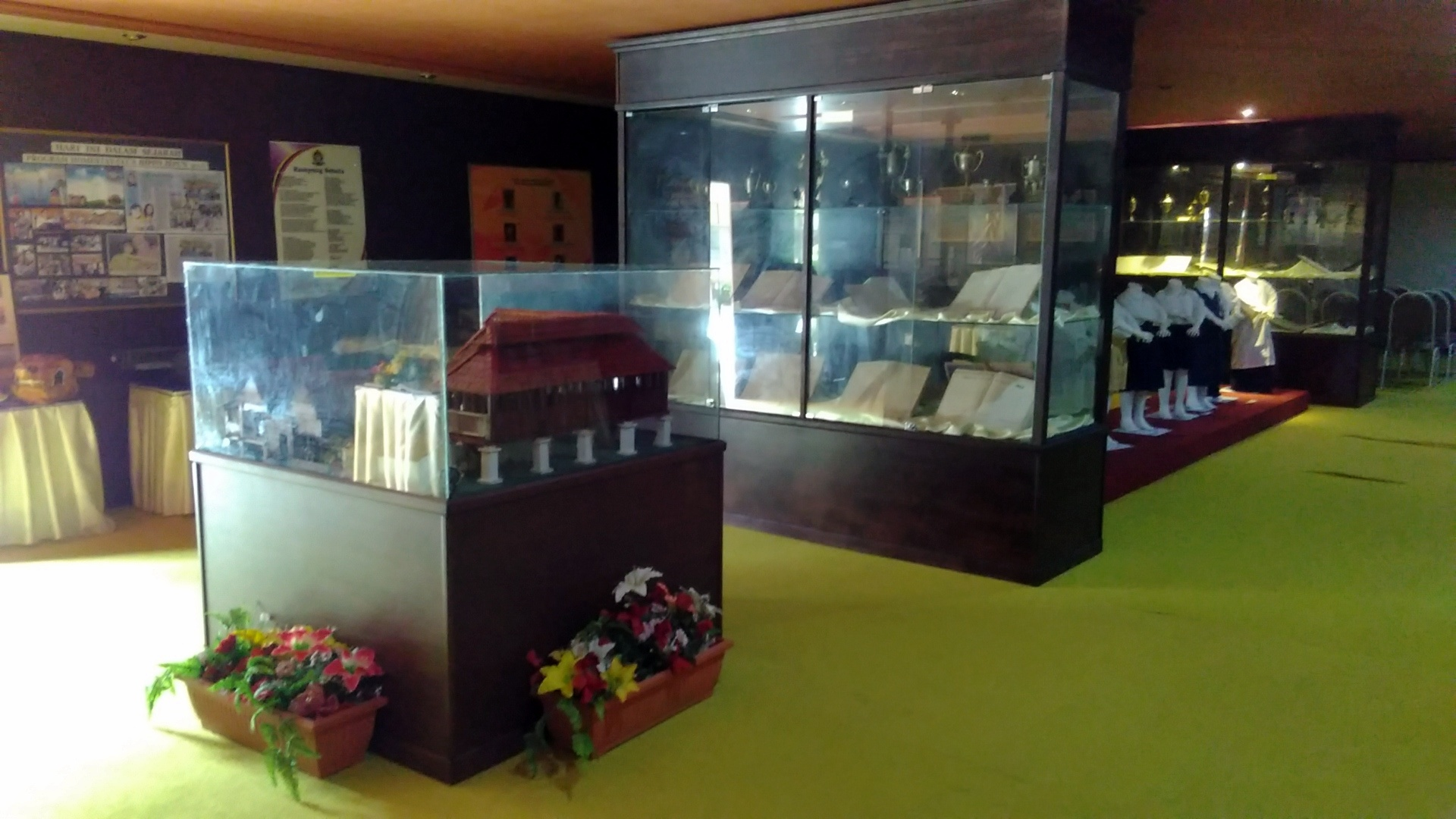 Ruang 4